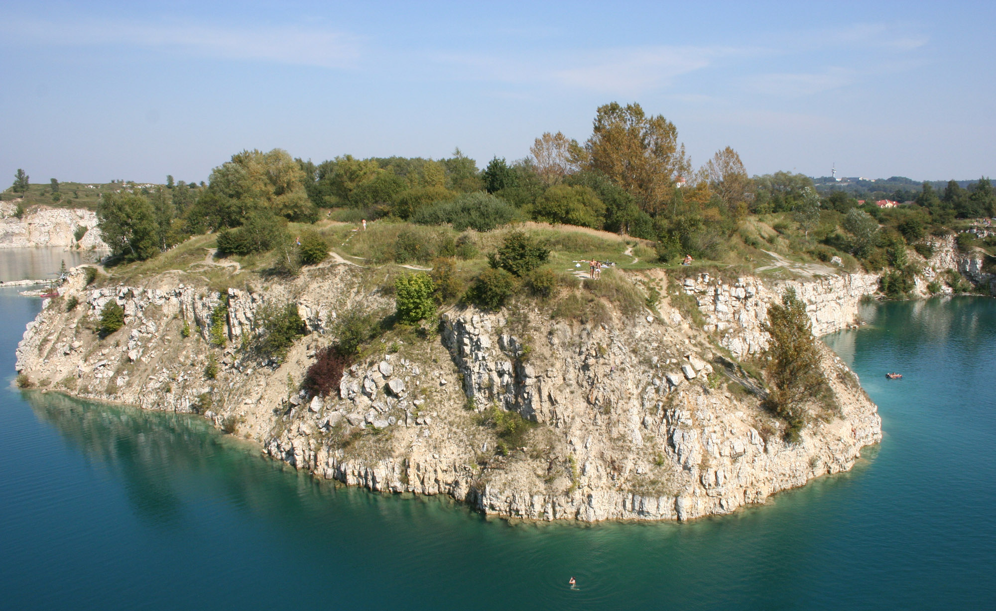 Zalany kamieniołom w Krakowie